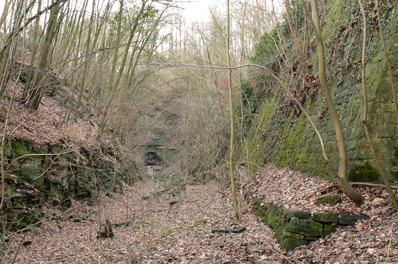 Klüttunnel